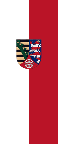 Flagge des Landkreises Sömmerda